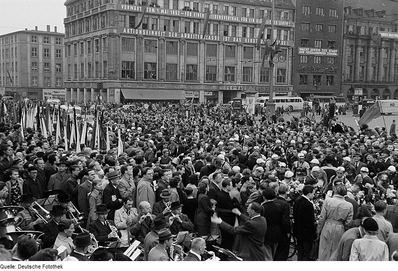 Original image description from the Deutsche FotothekRadrennfahrer beim Etappenstart auf dem Karl-Marx-Platz (heute: Augustusplatz)